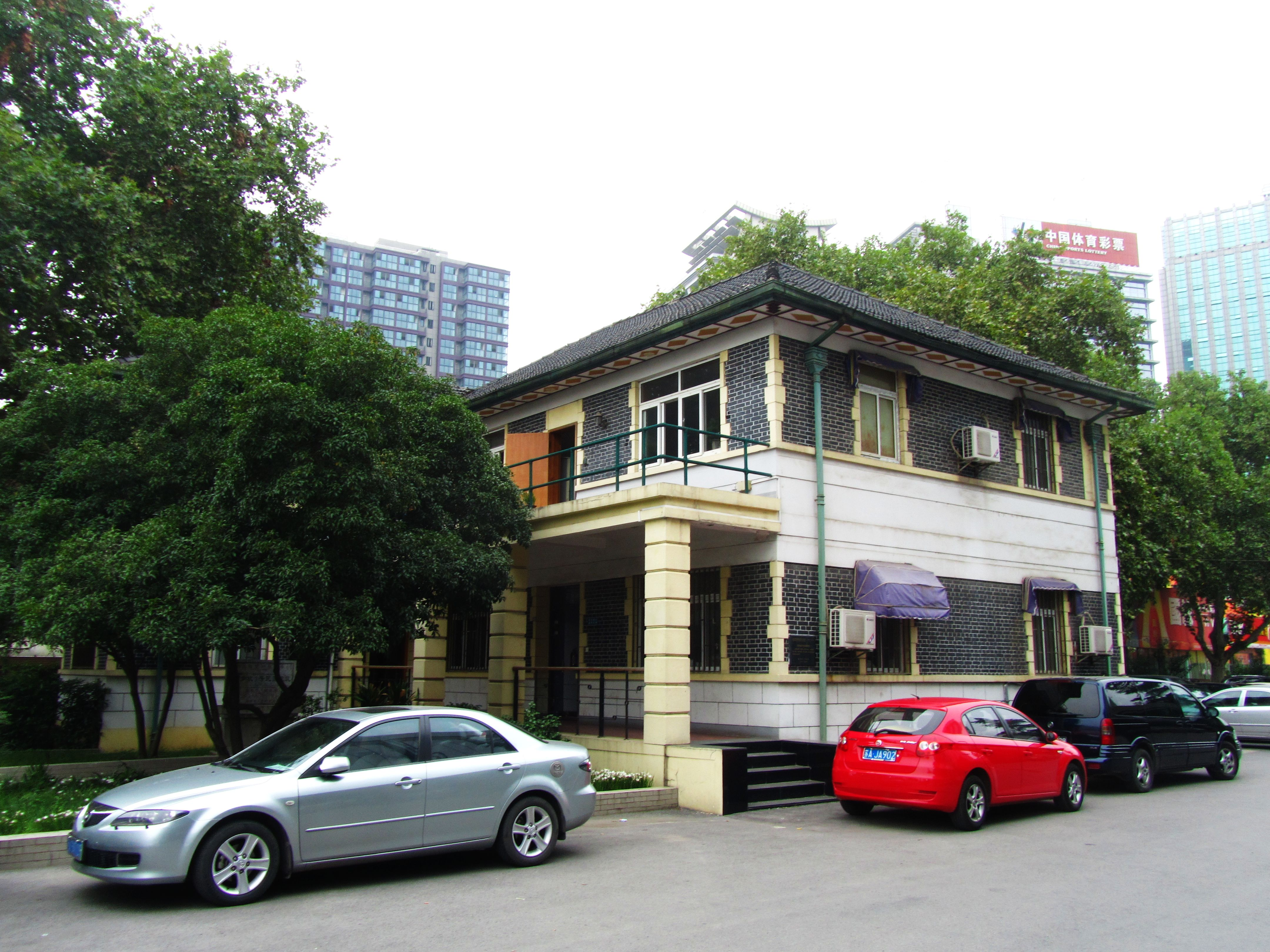 南京百步坡一号建筑，翁文灏公馆。